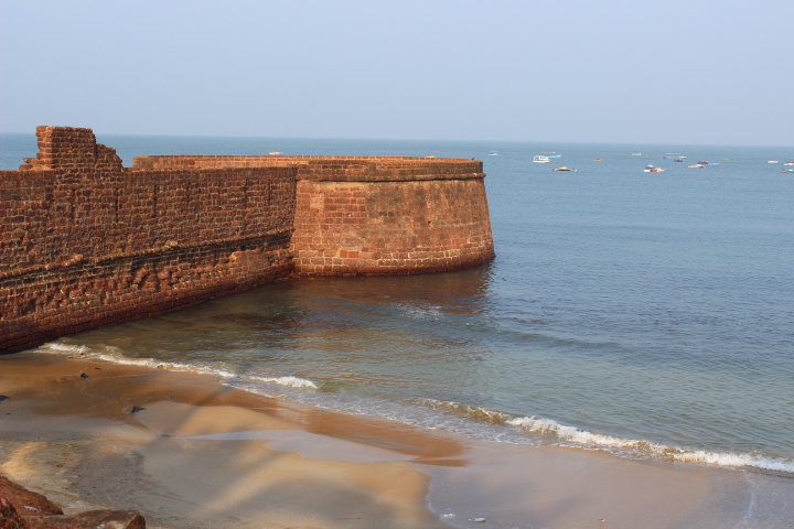 அகோடா கோட்டை கோவா